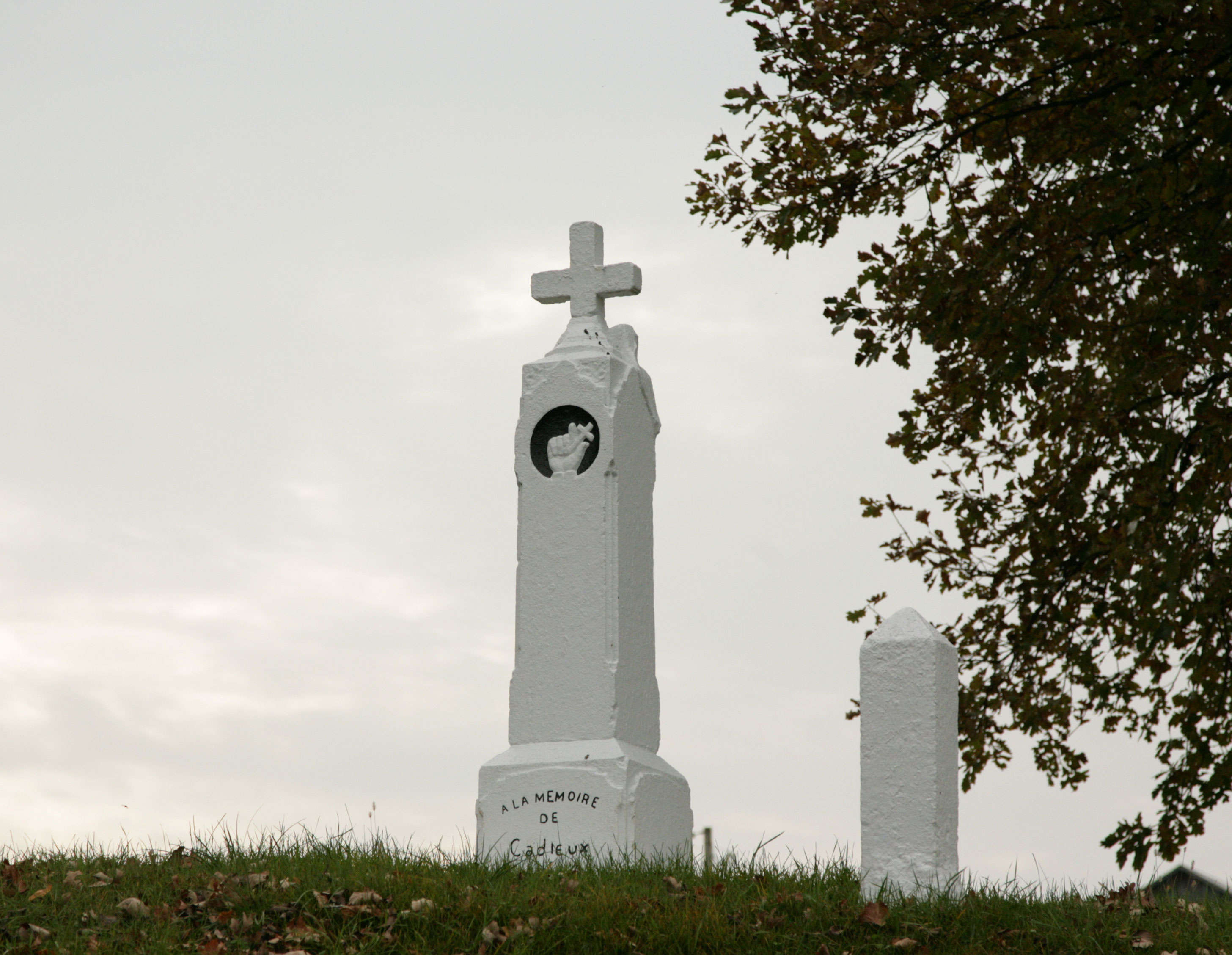 Monument à Cadieux, Ile-du-Grand-Calumet (Québec)